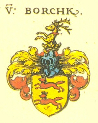 Wappen der Pommerischen und Sächsischen Adelsfamilie Borcke